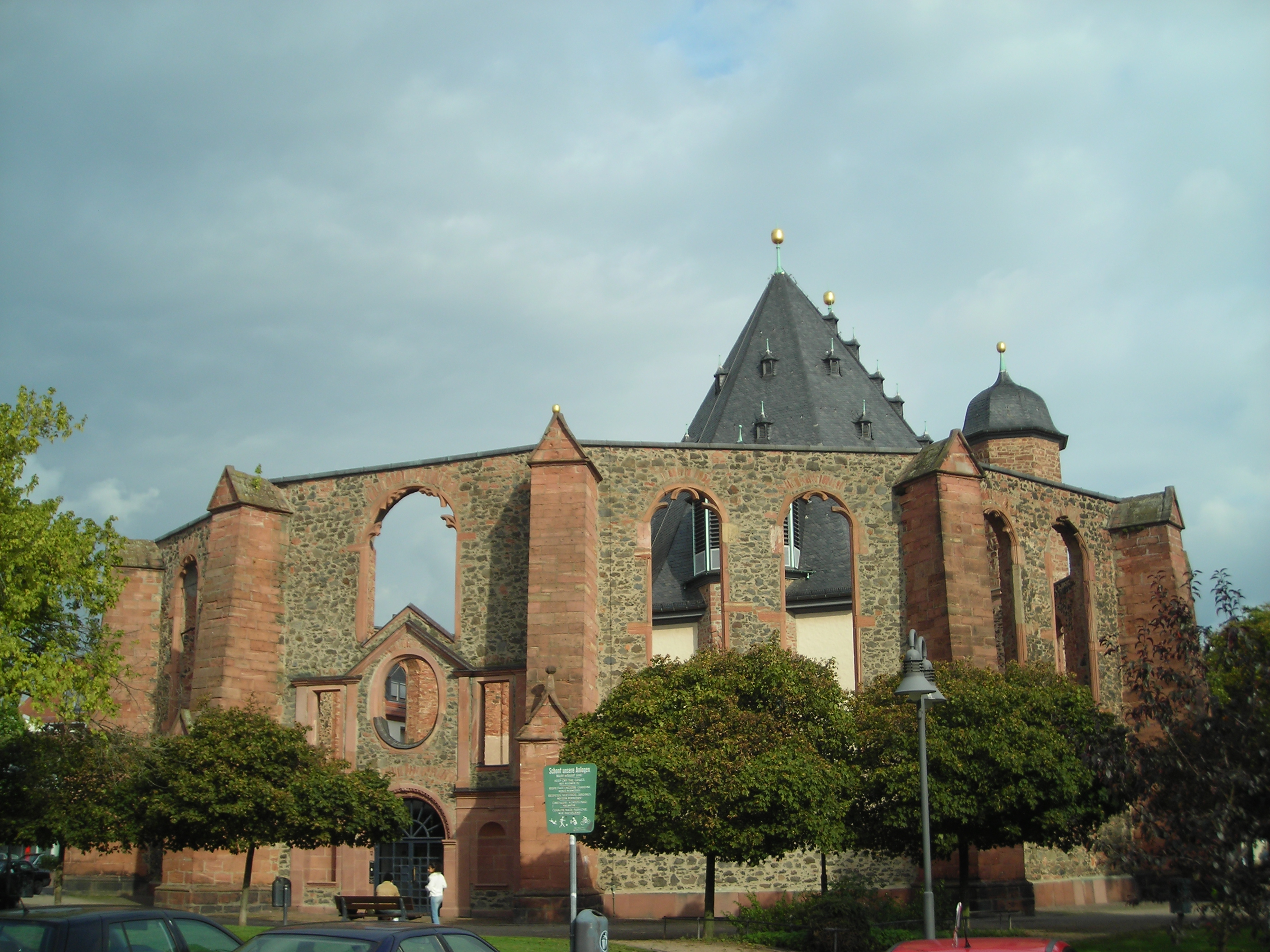 Wallonisch-Niederländische Doppelkirche in der Neustadt Hanau.